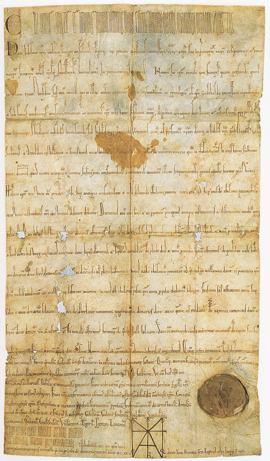 Het "tolrechtprivilege" met een tarieflijst van de Utrechtse tol. Noot: deze oorkonde is opgesteld samen met de "Stadsrechtenoorkonde"